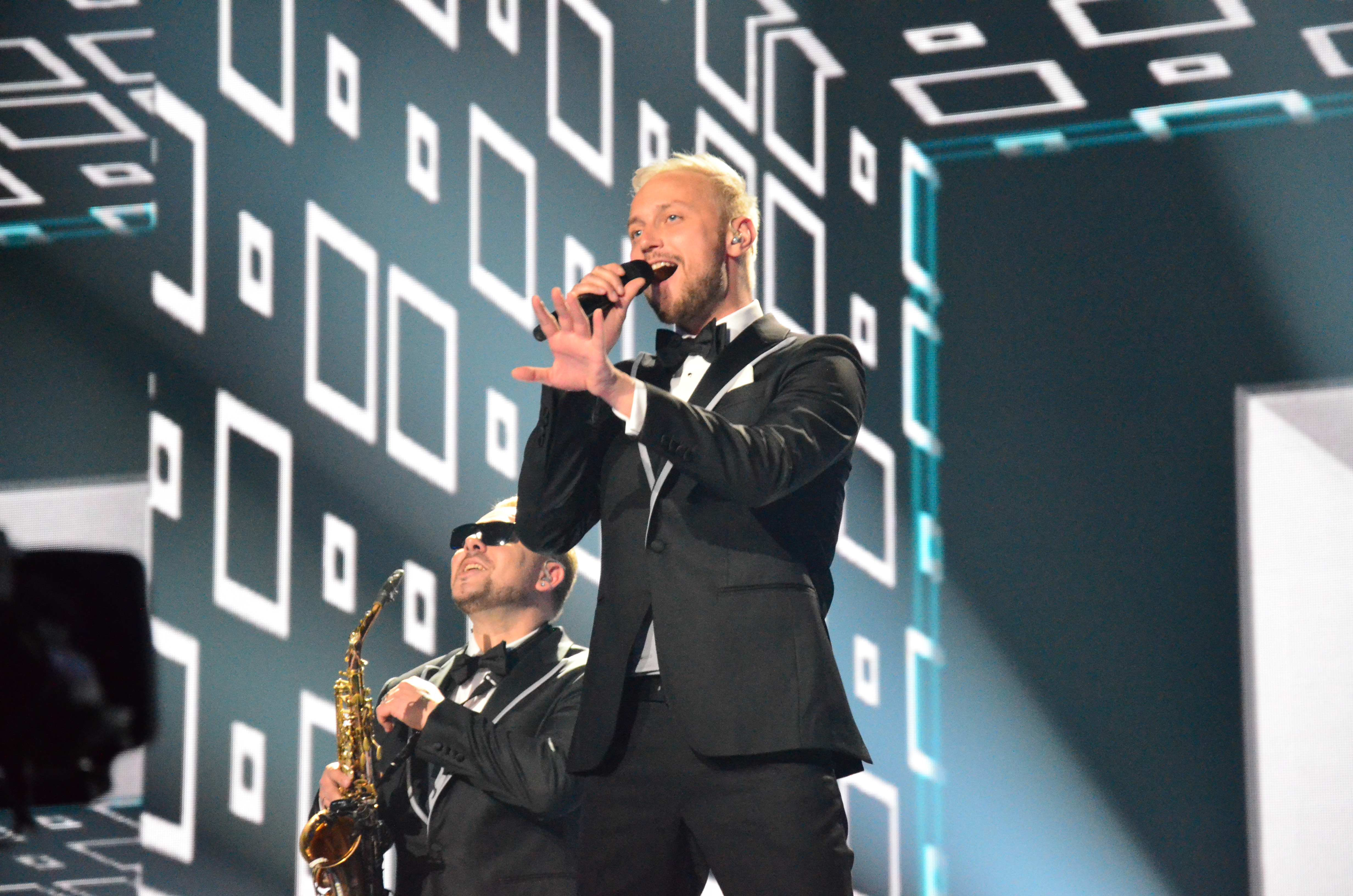 12 травня. Генеральна репетиція фіналу Євробачення 2017. Sunstroke Project (Moldova).